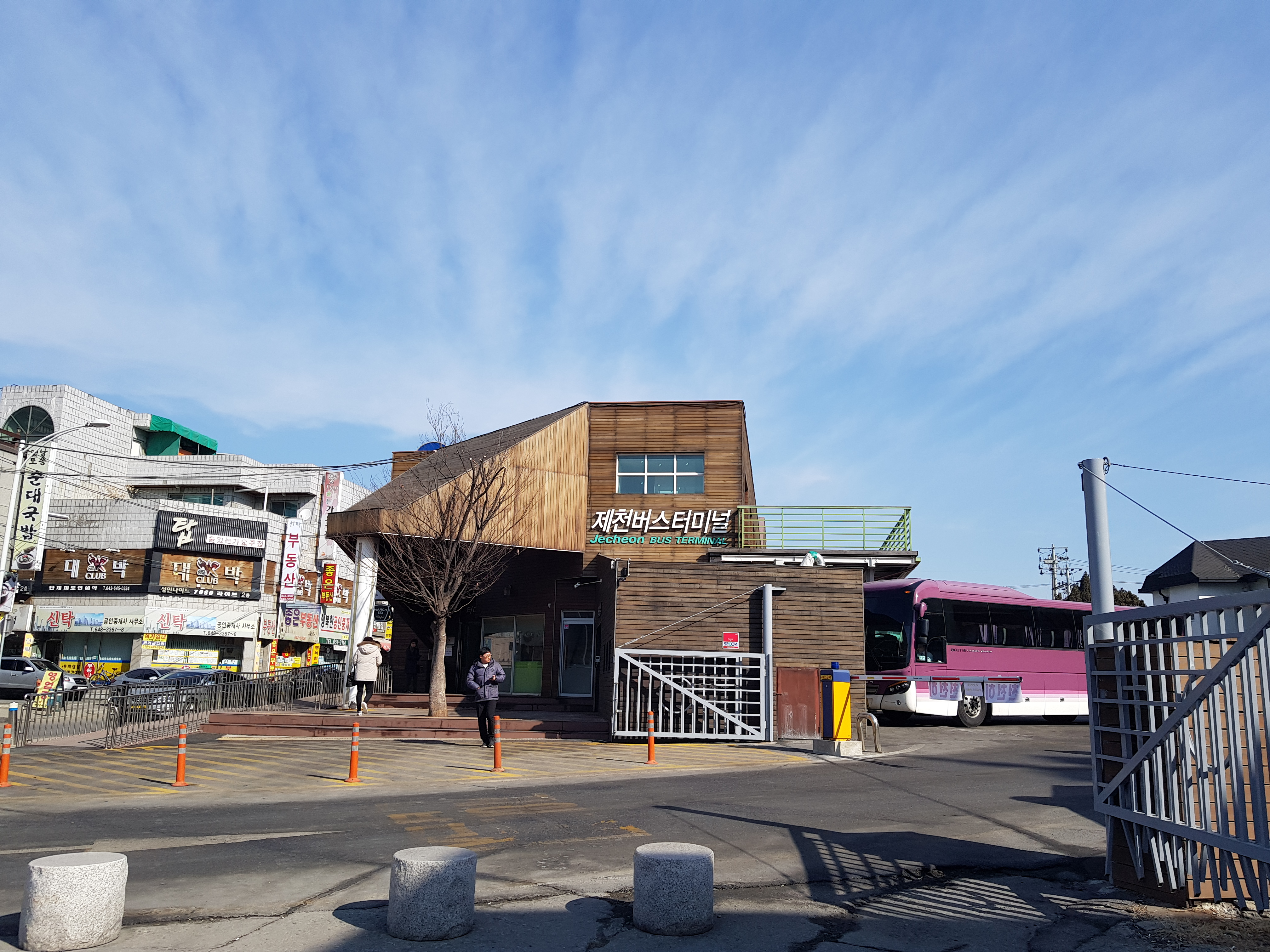 2018년 2월 15일에 촬영된 제천시외버스터미널